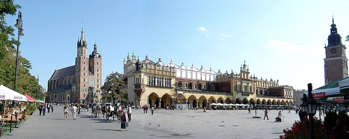 Panoramabild, Krakau, Hauptmarkt